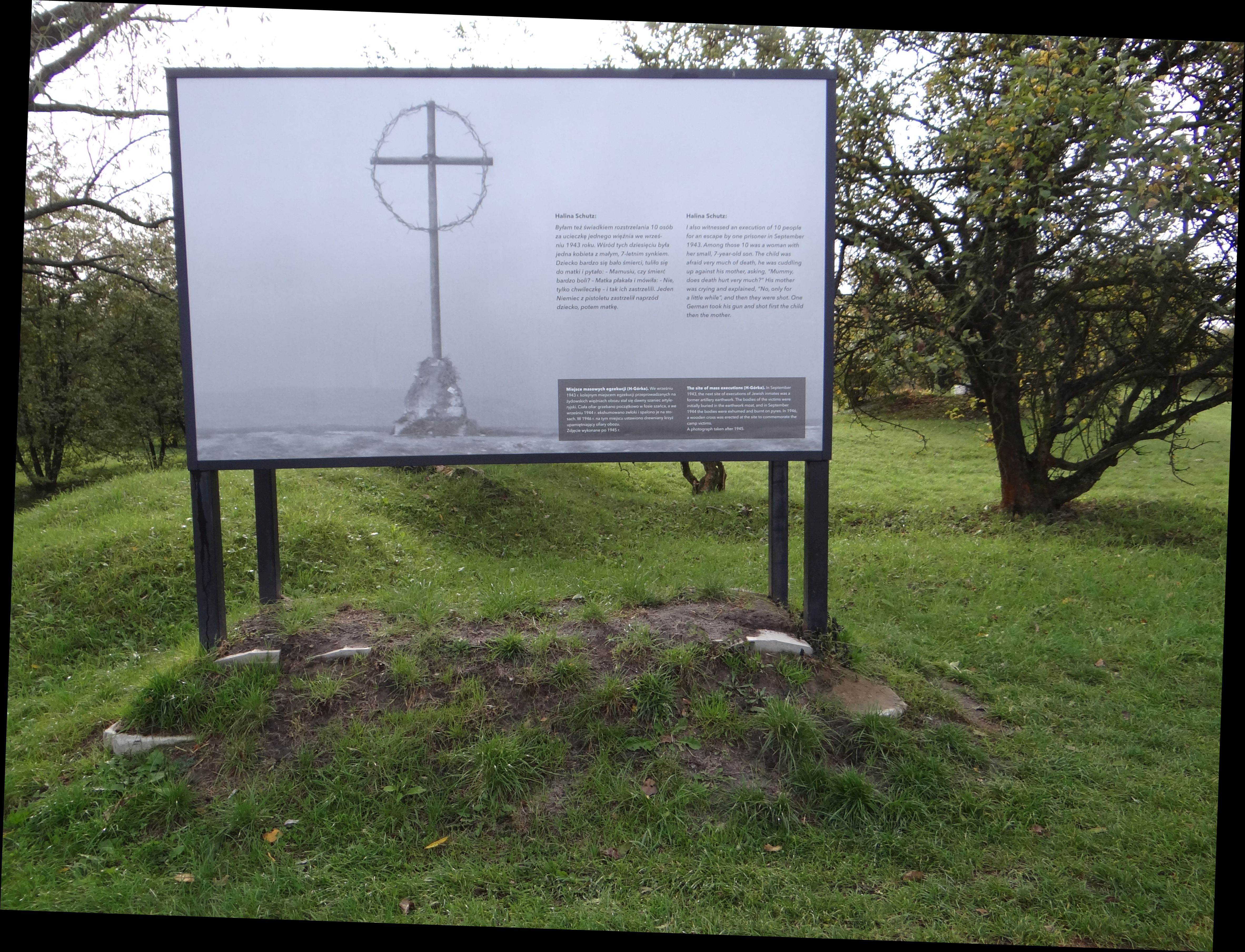 Tablica upamiętniająca na terenie niemieckiego obozu koncentracyjnego Plaszow